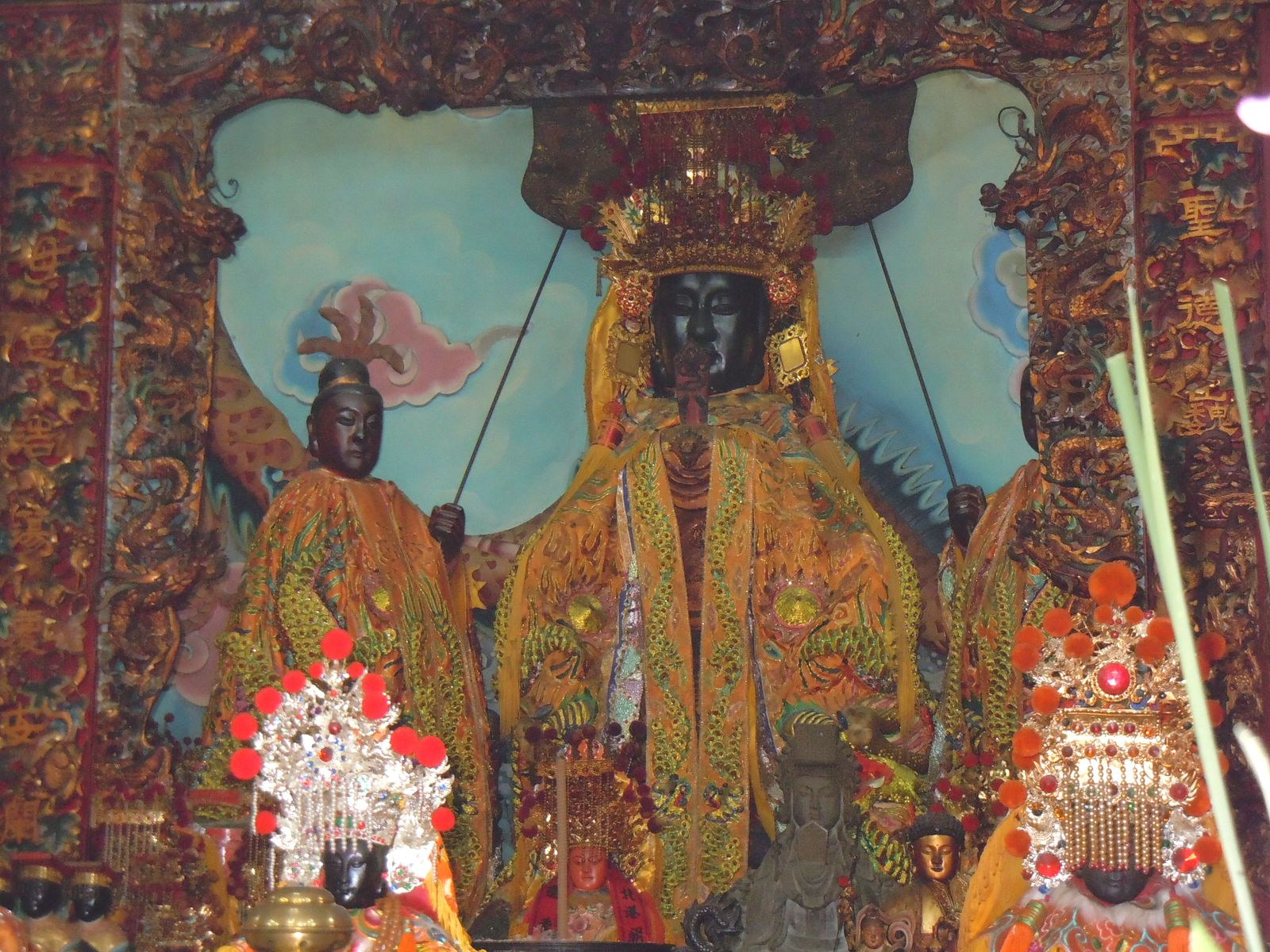 中文（台灣）: 南投慈善宮慈善媽。